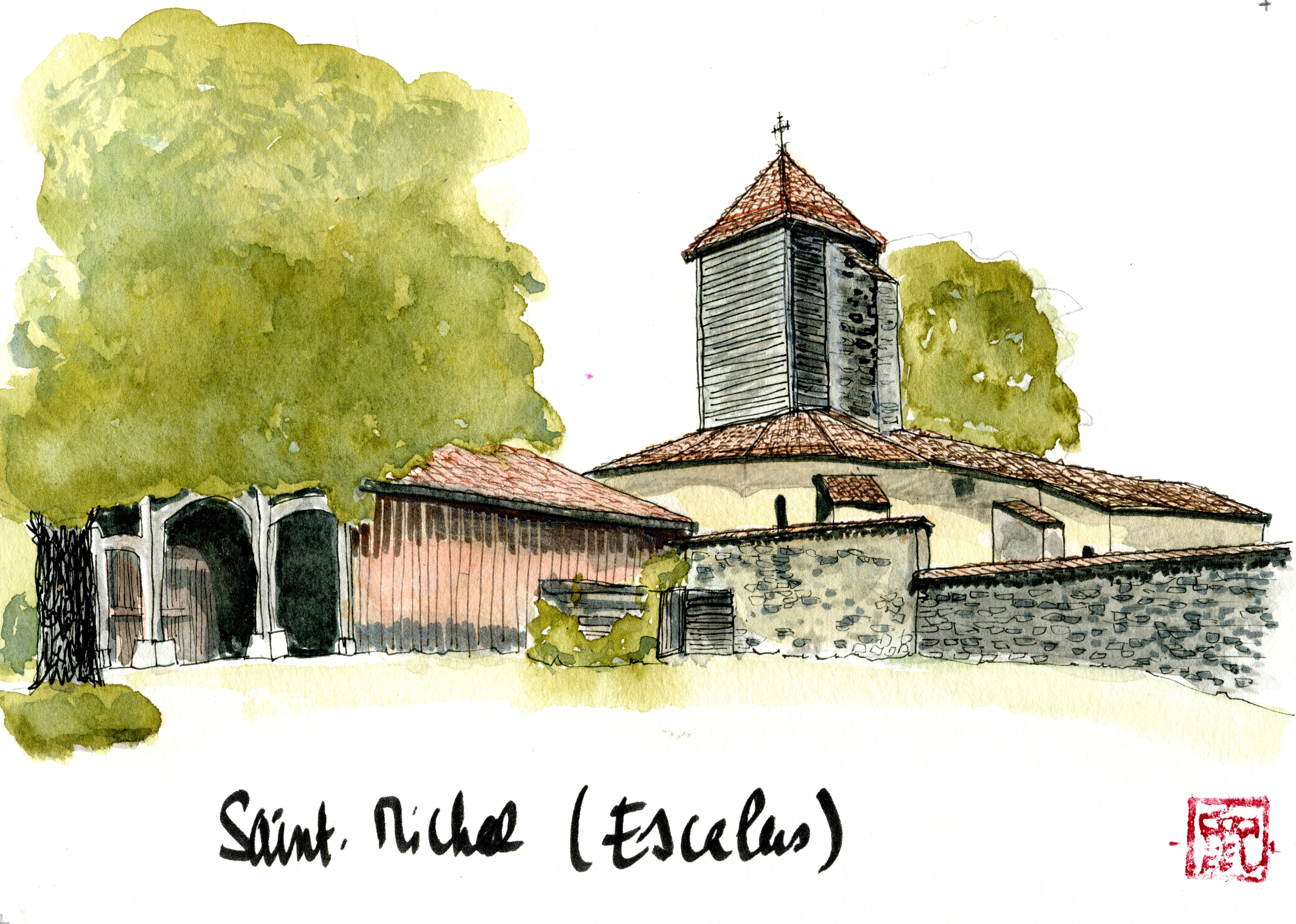 Aquarelle de l'église Saint-Michel, sur la commune de Saint-Michel-Escalus dans le département français des Landes.